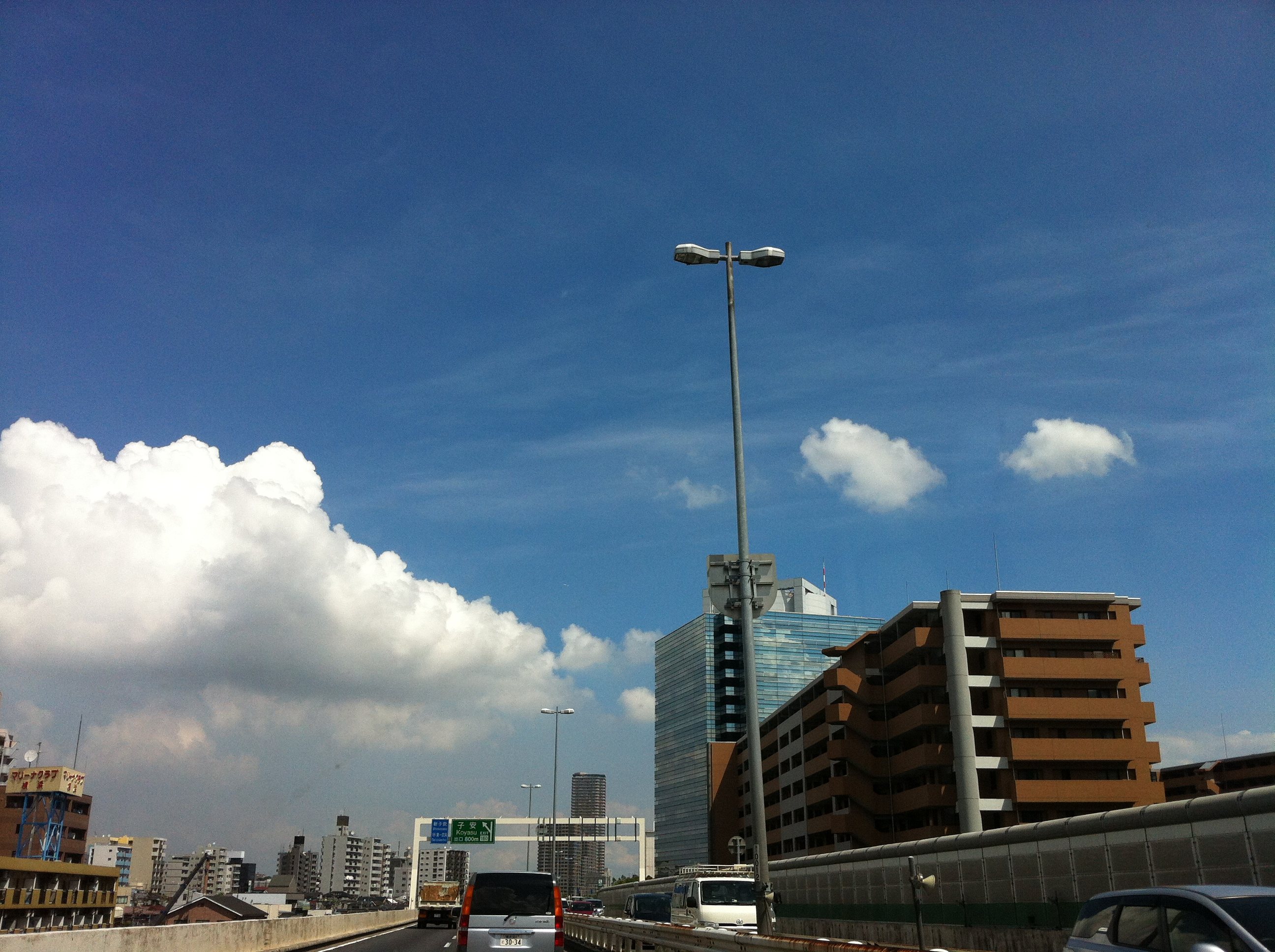 2 Chome Shinurashimachō, Kanagawa-ku, Yokohama-shi, Kanagawa-ken 221-0031, Japan